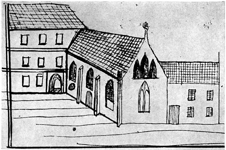 Alte Zeichnung des Magdalenenstifts im Schüsselkorbe, Domhof 21, Hildesheim; links der Bischofshof